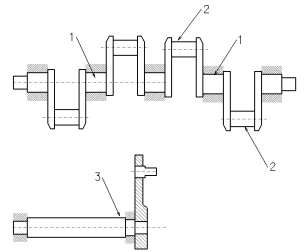 Wał korbowy - schemat